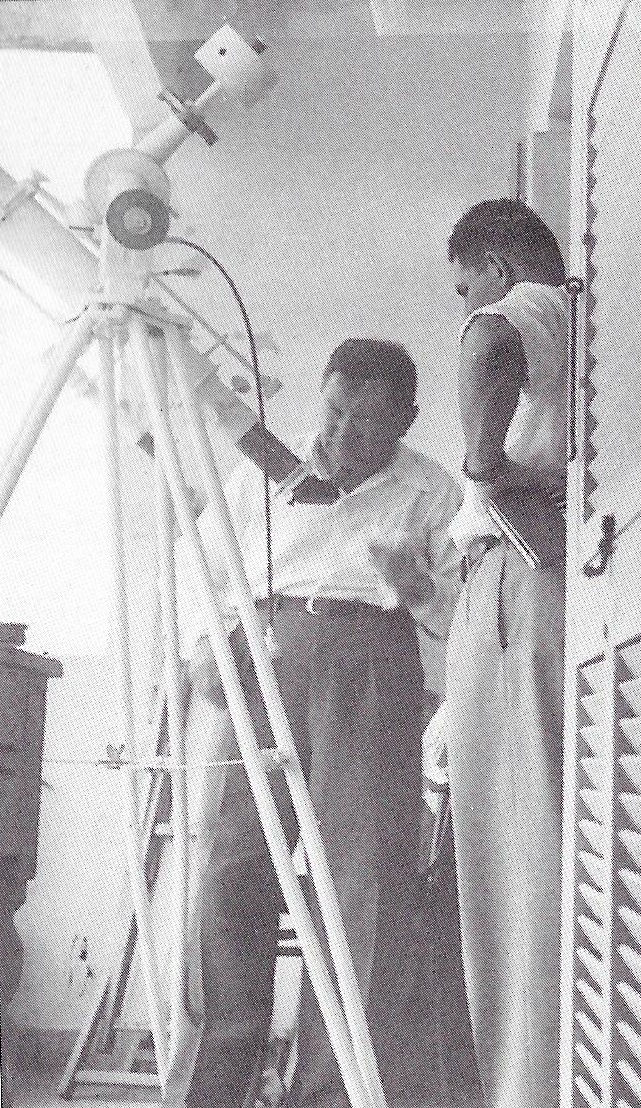 דוד זכאי עם הטלסקופ על גג הבית תצפית לכוכבים ולשירות ההגנה .